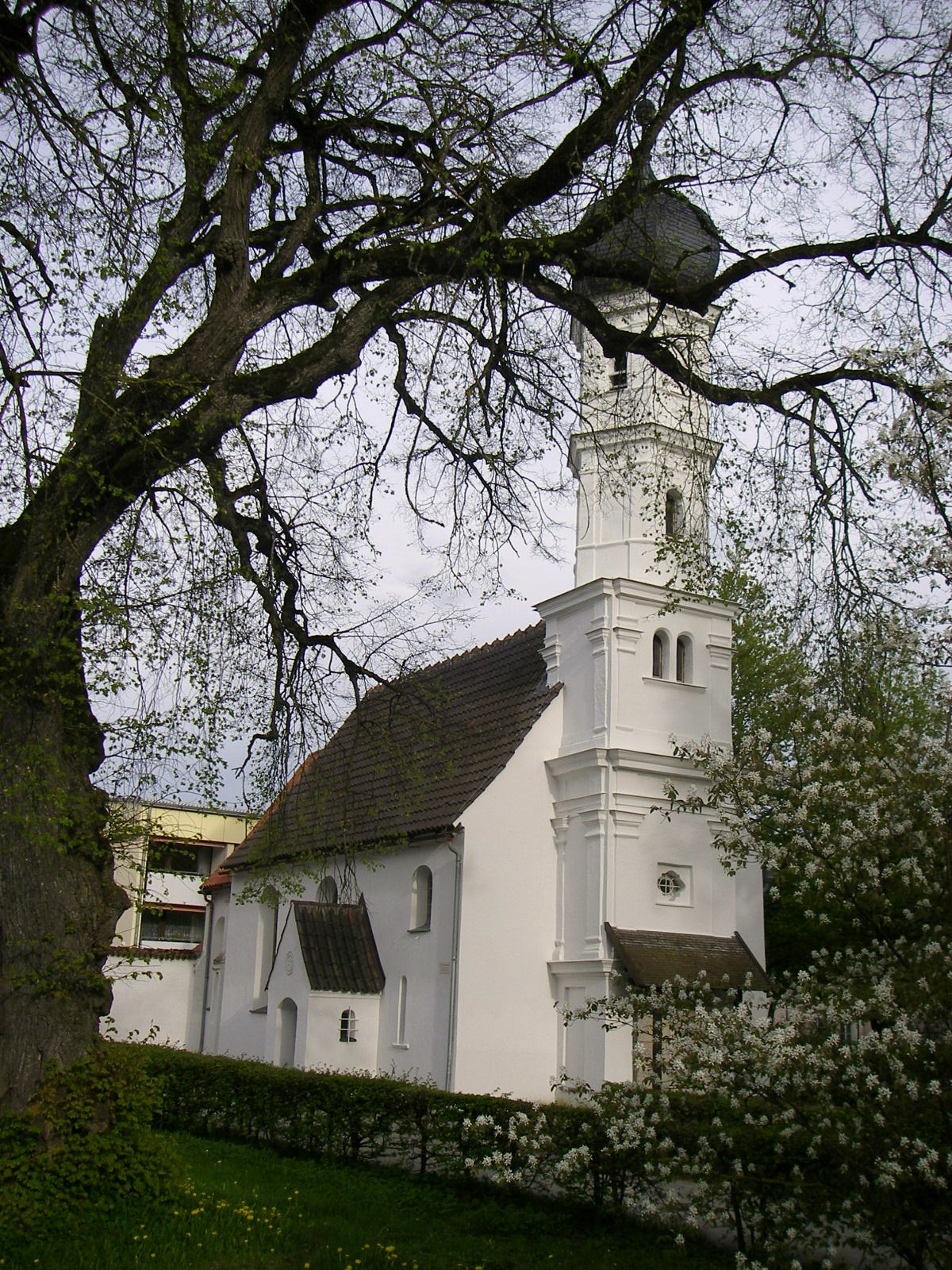 St. Dominkus Church, Kaufbeuren, Bavaria, Germany